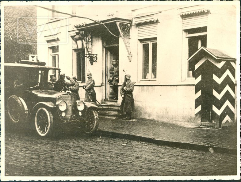 Bezoek van keizer Willem II